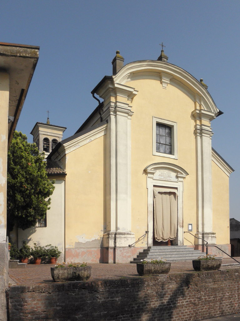 La chiesa parrocchiale di Fengo, fraz. di Acquanegra Cremonese